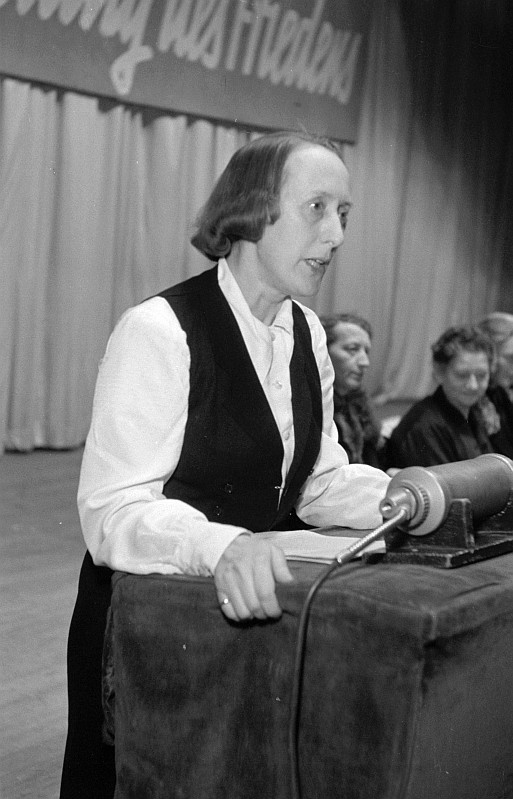 Original image description from the Deutsche FotothekGreta Kuckhoff, Haber (München), Dr. Barbara v. Renthe (Berlin)